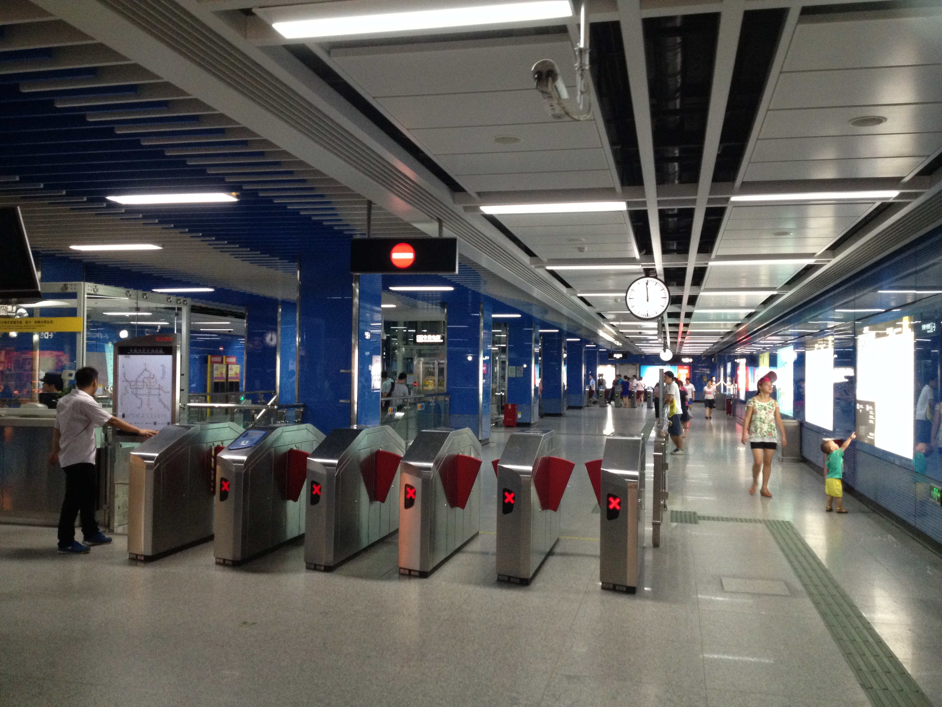 广州地铁车陂站站厅